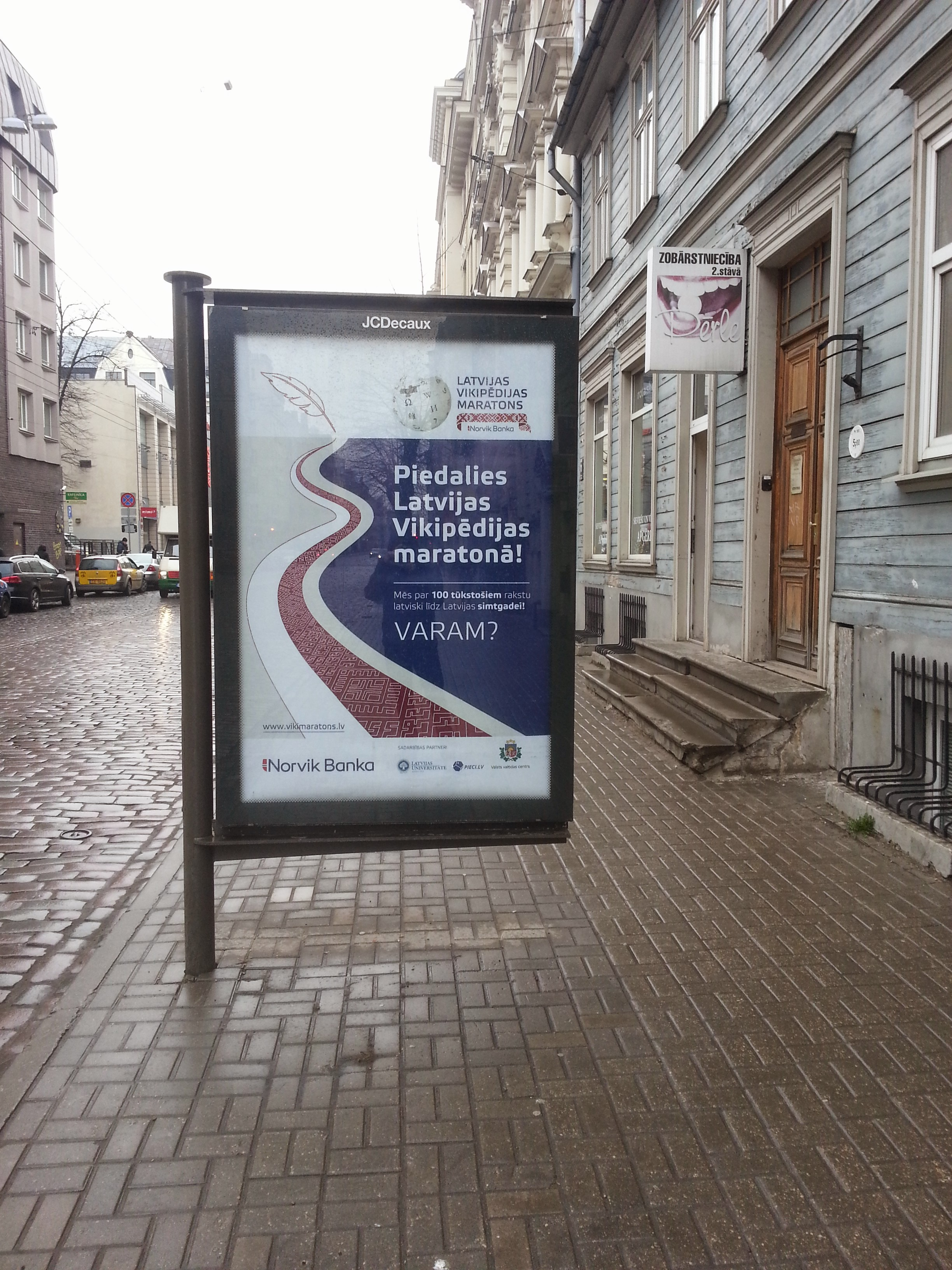 Vikimaratona plakāts Rīgā, Ģertrūdes ielā